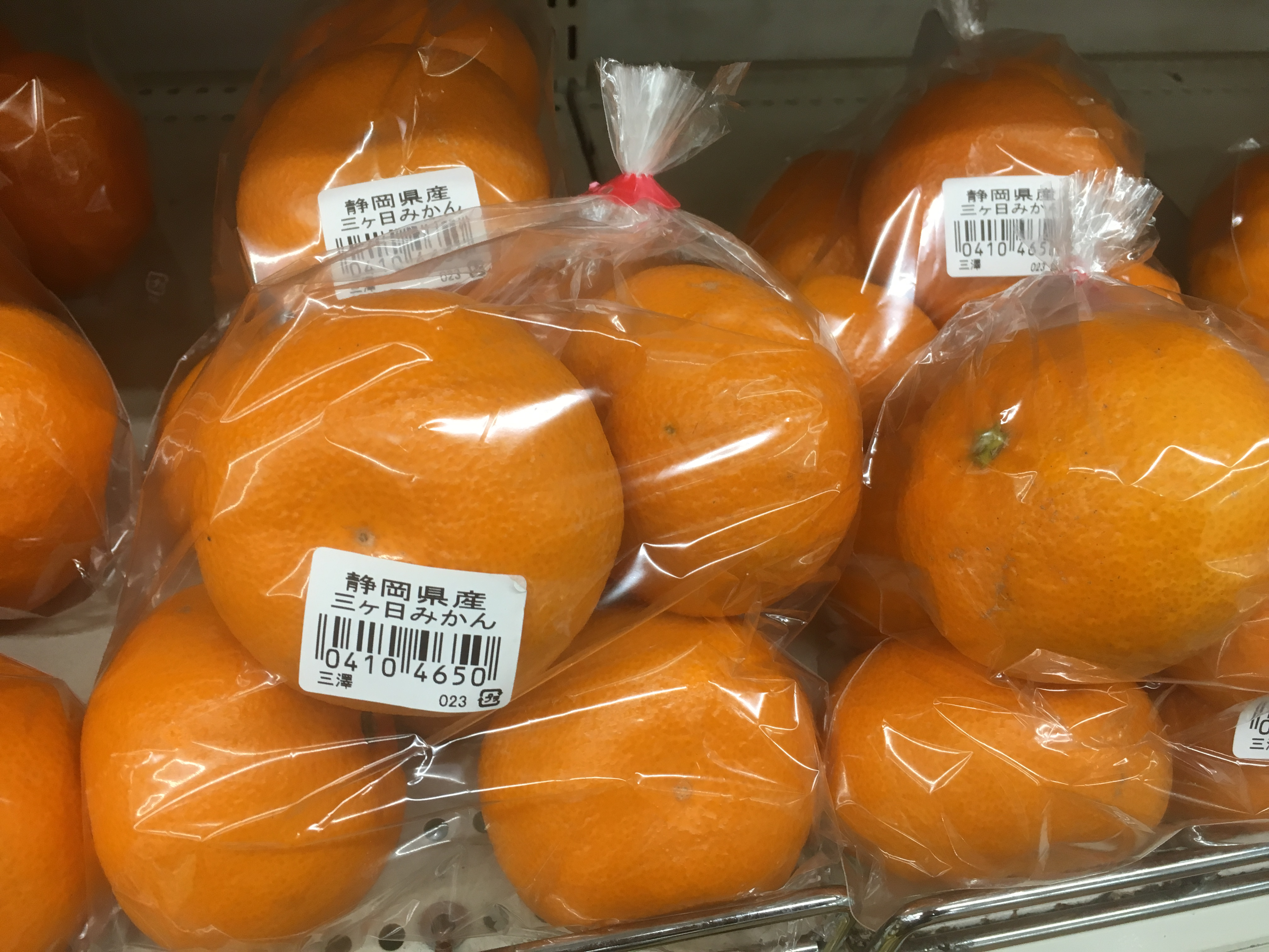 三ケ日みかん (mikkabi mikan)